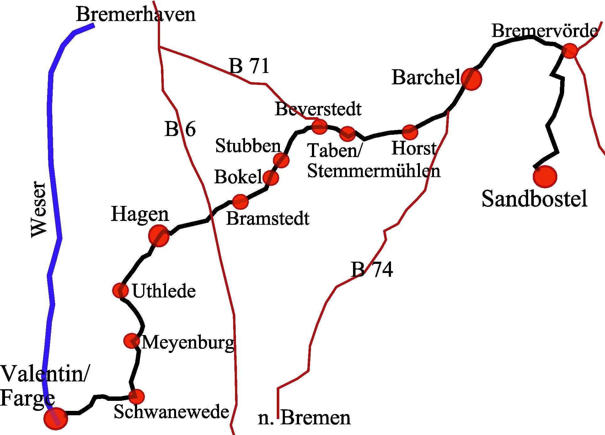 Verlauf des Todesmarsches vom Bunker Valentin in Bremern/Farge zum Lager Sandbostel bei Bremervörde (Stammlager X B)